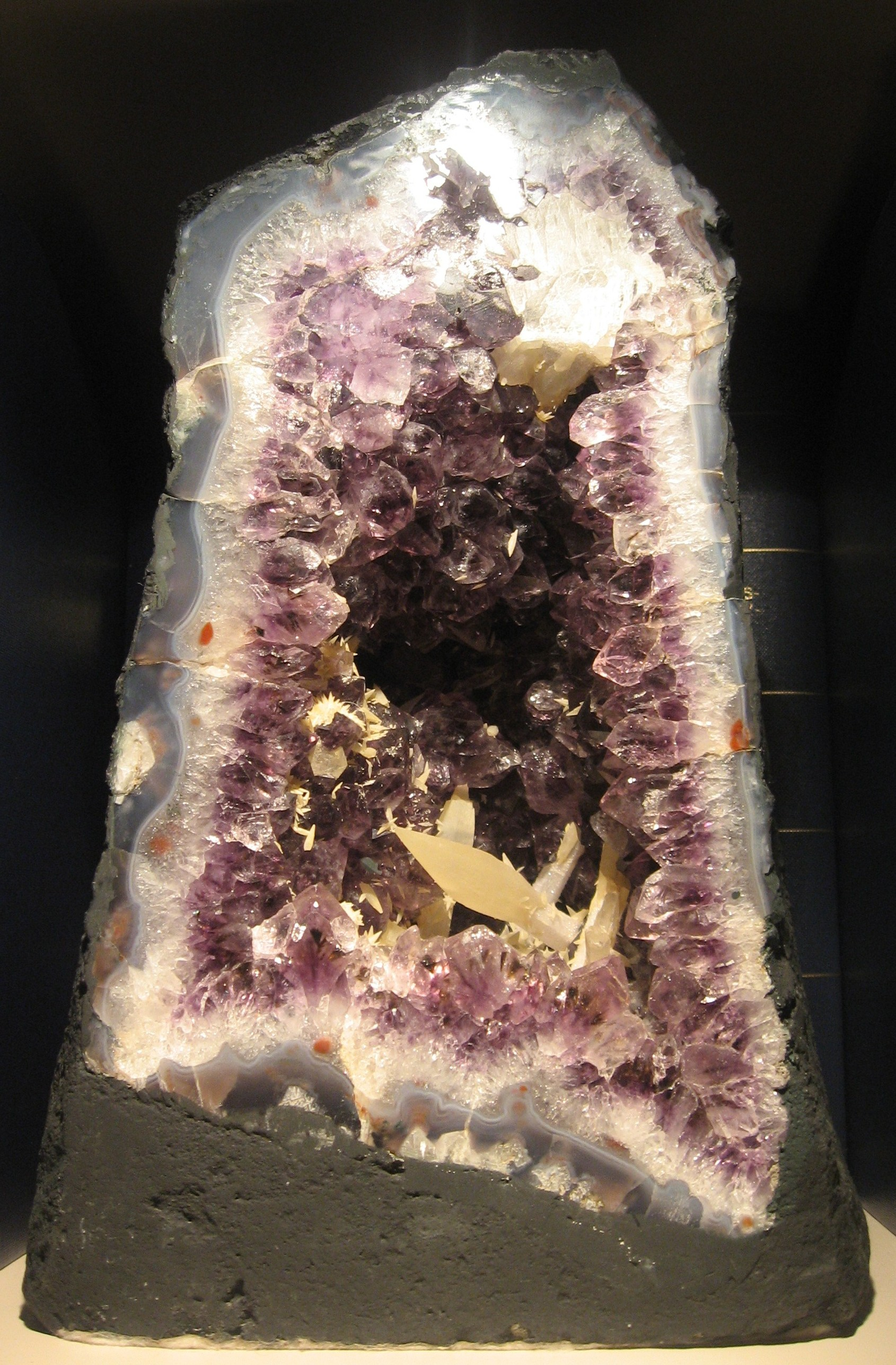 Amethystdruse mit Calcitnadeln